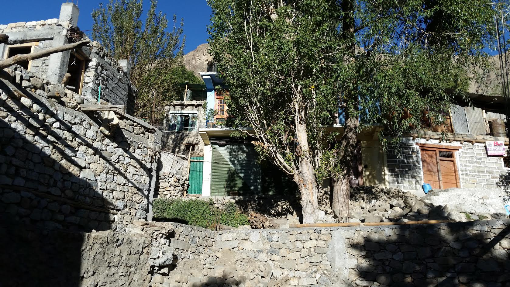 Turtuk, Ladakh, Indien